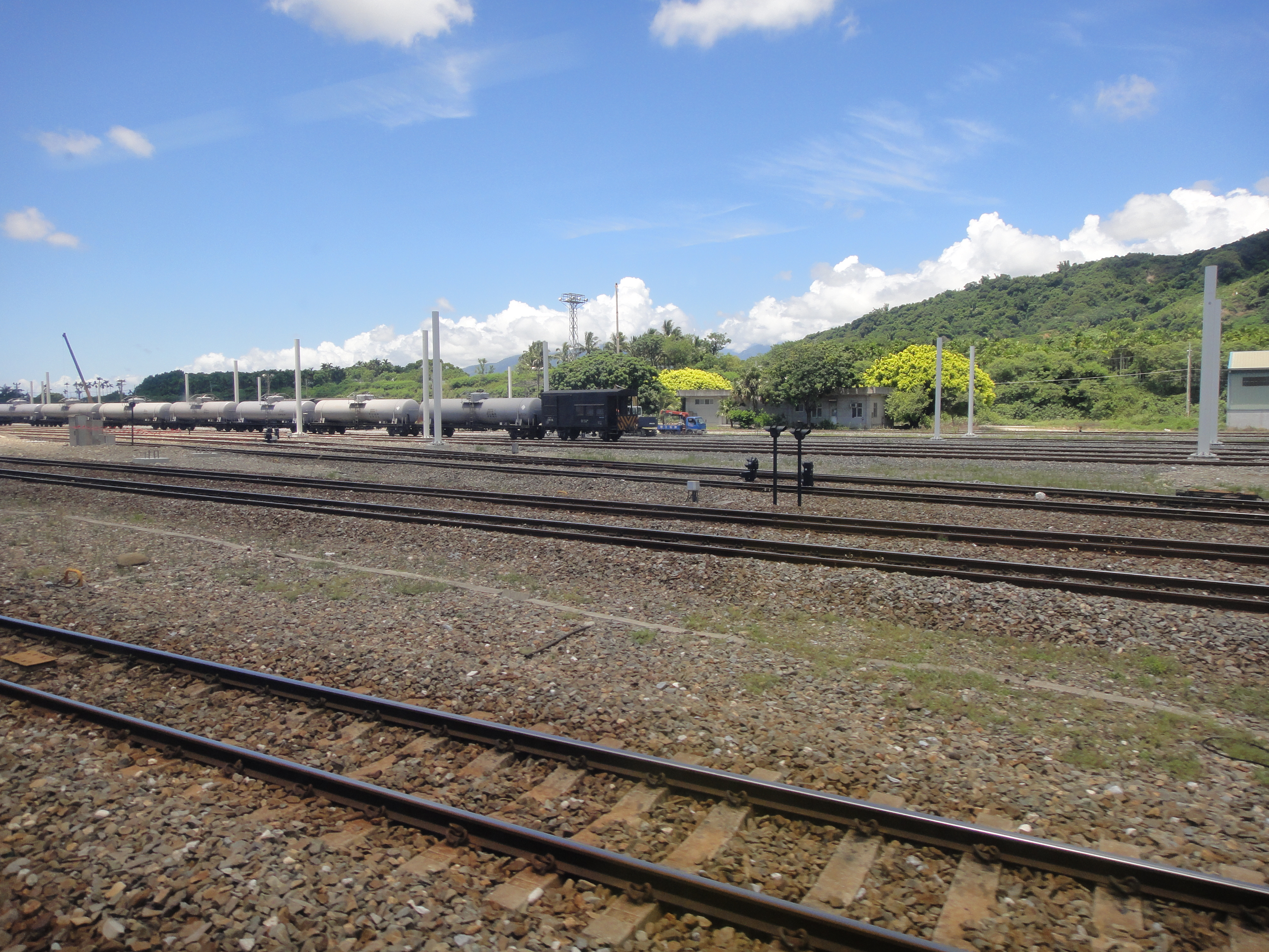 台東車站暨台東機務段北側，電氣化高壓電線塔柱。